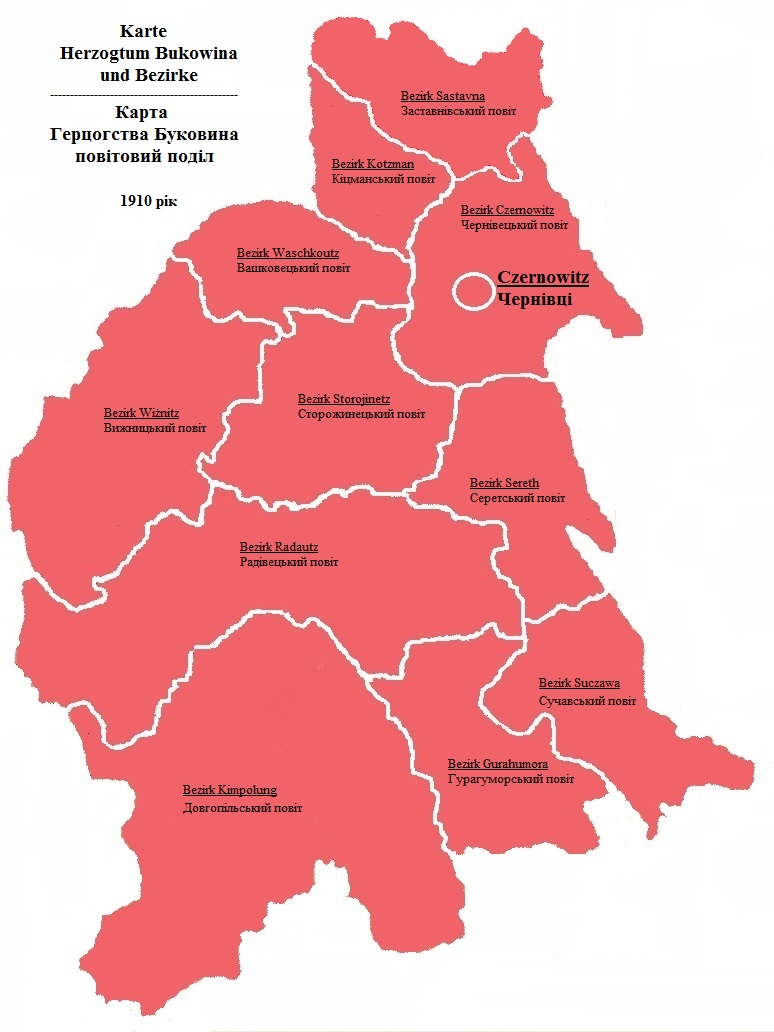 повіти Герцогства Буковина